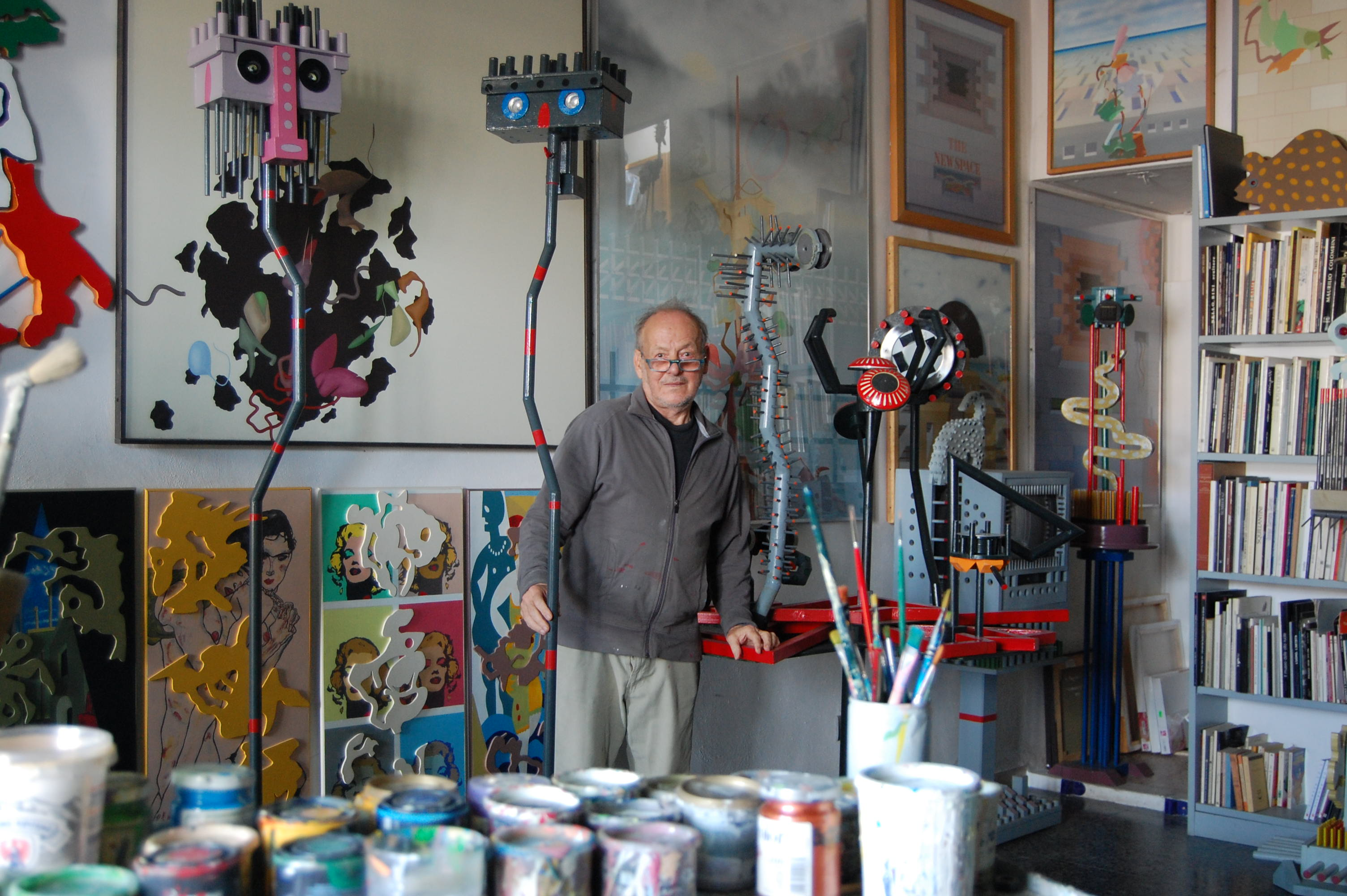 Giampiero Poggiali Berlinghieri nel suo studio a Firenze